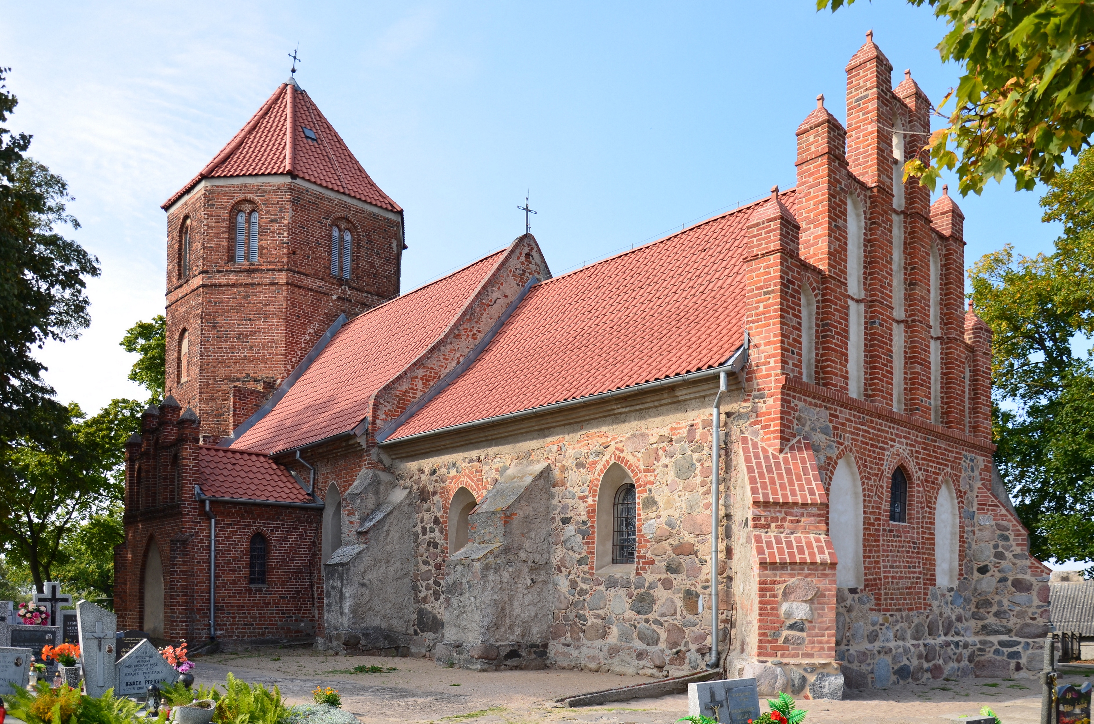 Niedźwiedź, kościół pw. św. Jerzego, XIII-XIV